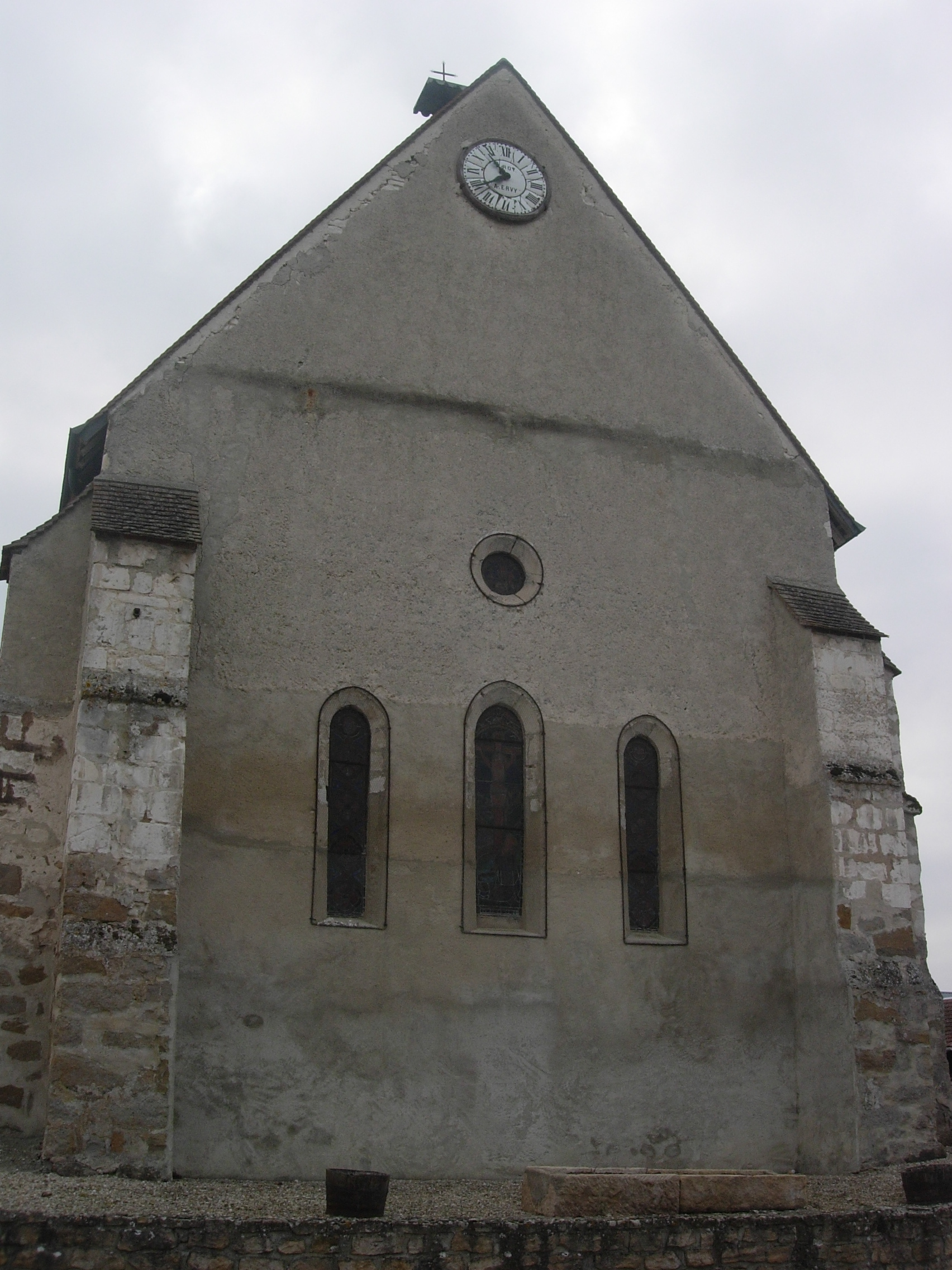 Eglise romane Sainte Madeleine de Prunay-Belleville (Aube) : chevet